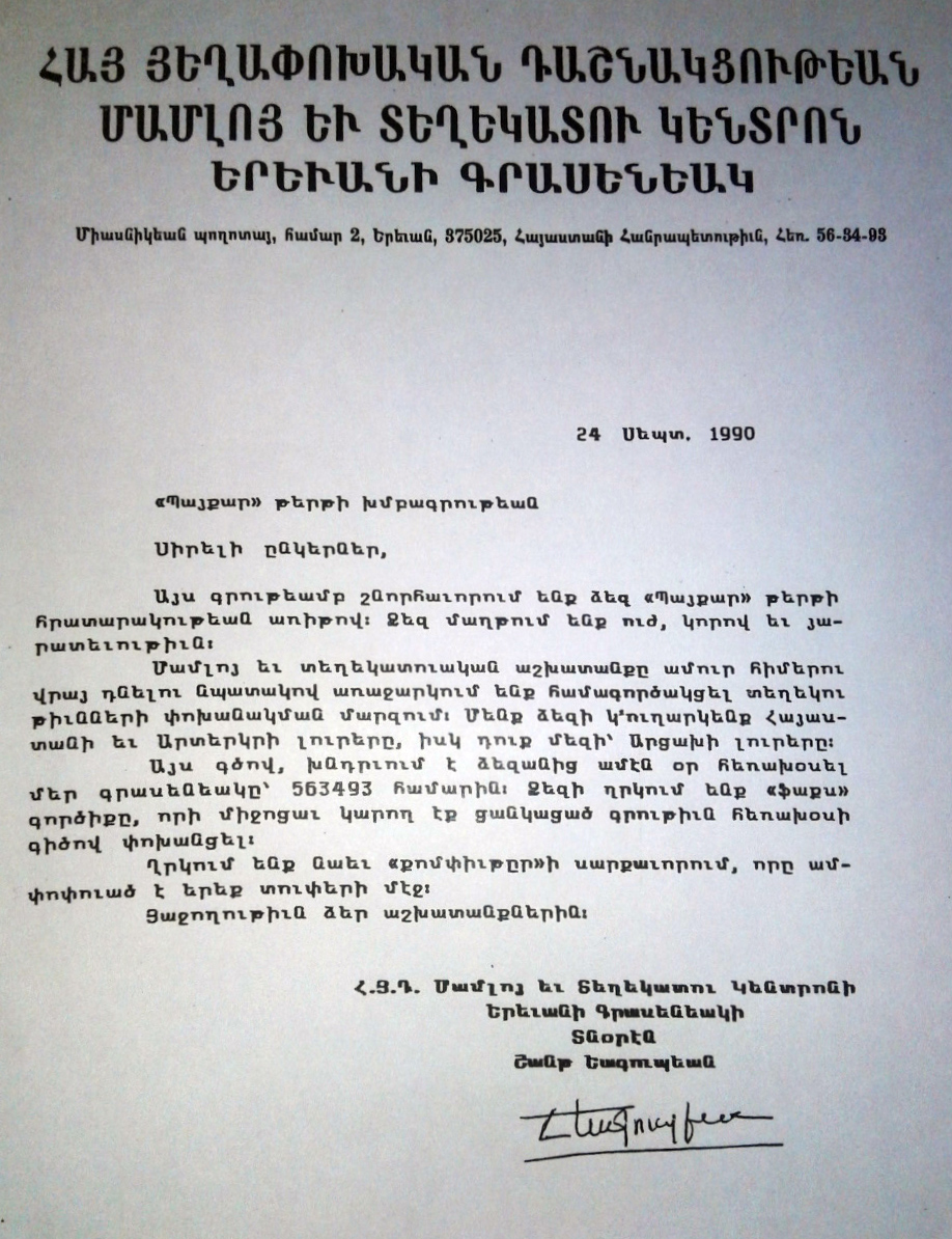 Պայքար թերթ